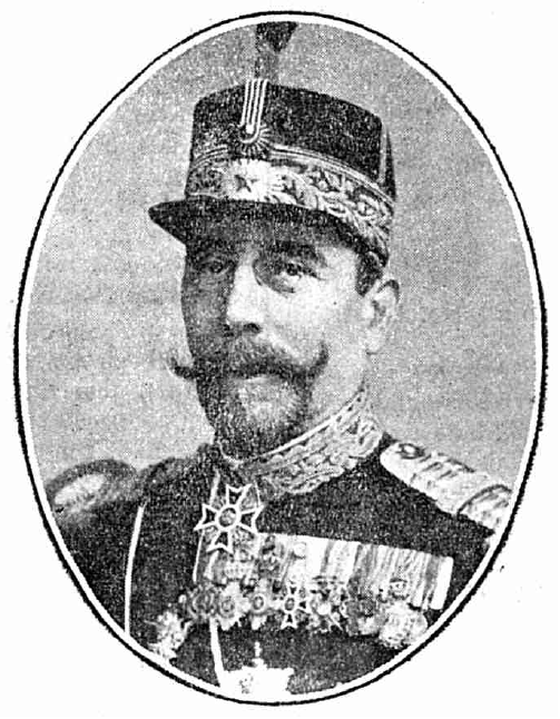 Sursa - "Bucureştii", Anuarul Ilustrat al Capitalei pe anul 1910, Tipografia Horia Carp & Marinescu, Bucureşti, 1910 Restricţii - Fără restricţii datorită vechimii (peste 100 de ani). Imaginea a fost în domeniul public încă de la publicare (anul 1910).